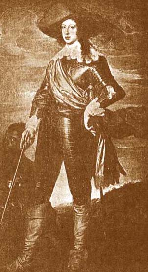 Francesco_di_cosimo_ii_de'_medici